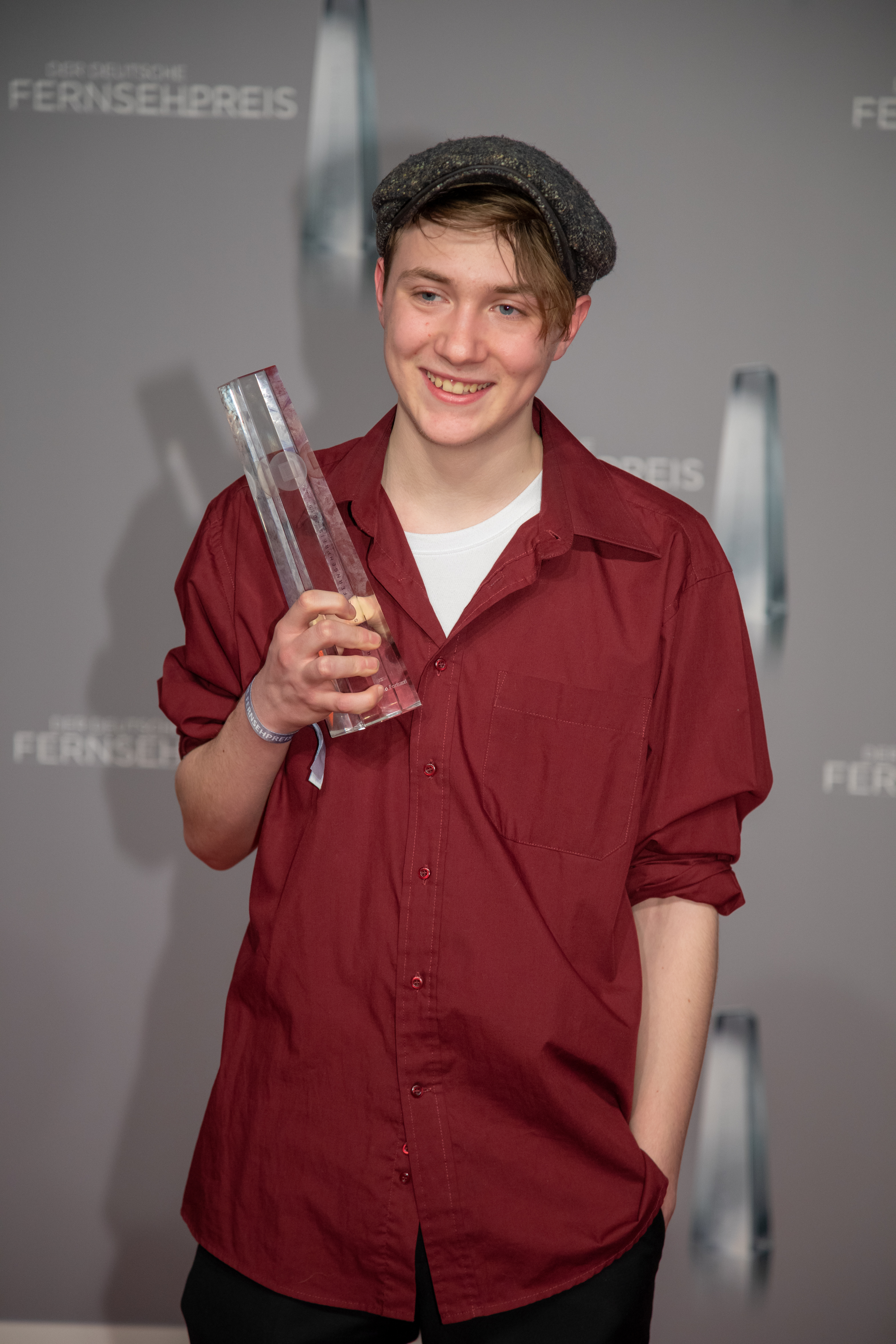 Michelangelo Fortuzzi beim Deutschen Fernsehpreis 2019 in der Düsseldorfer Rheinterrasse